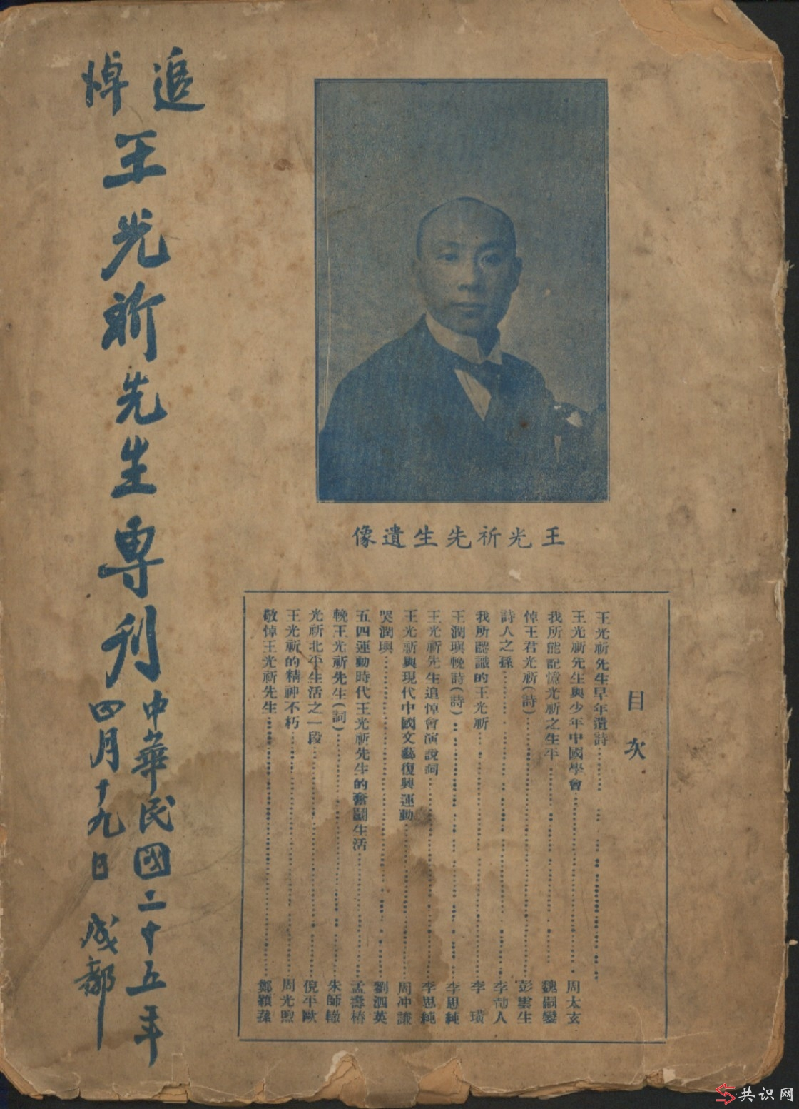 中文（香港）: 中華民國二十五年四月十九日出版的《追悼王光祈先生專刊》